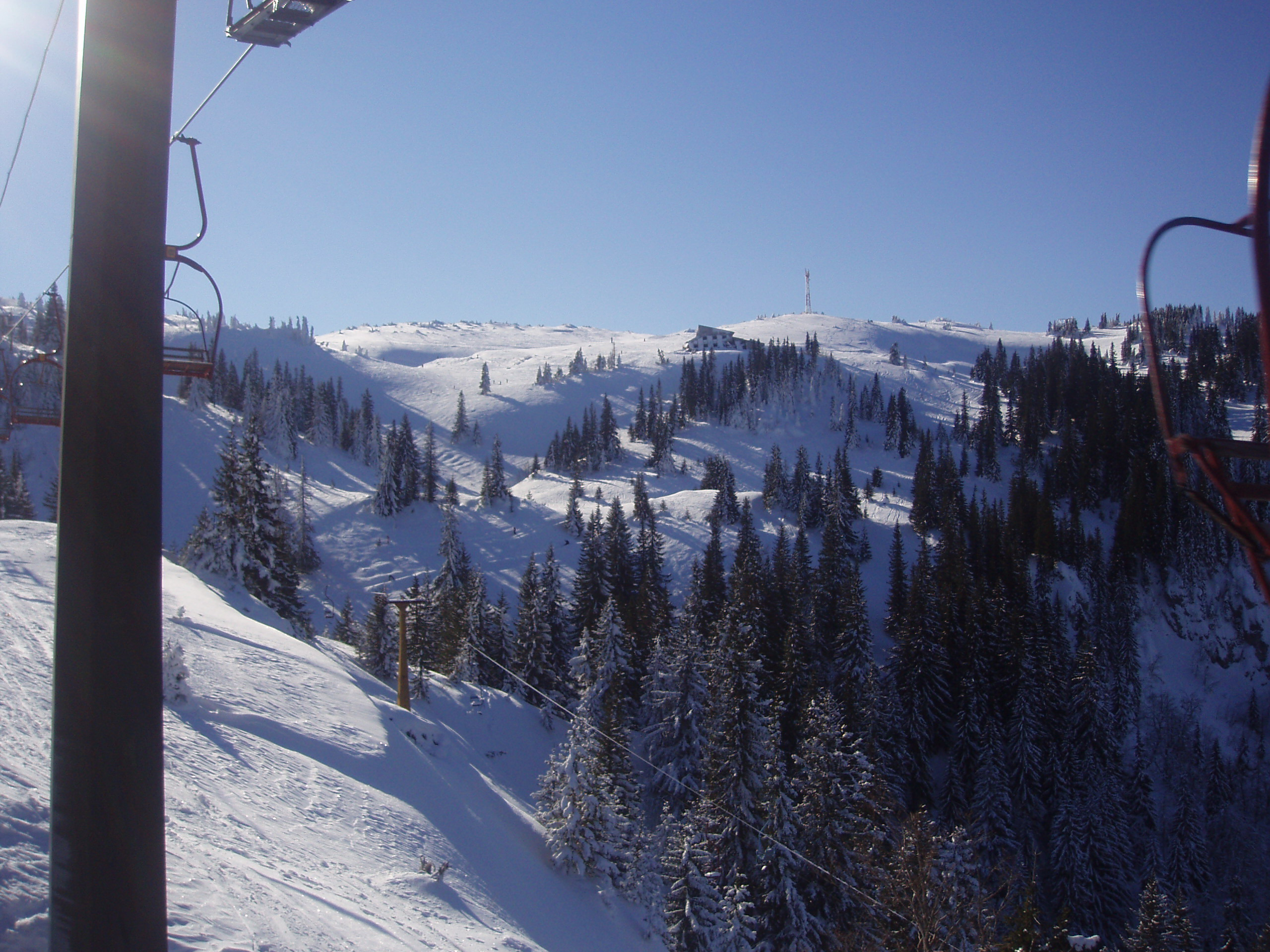 Jahorina